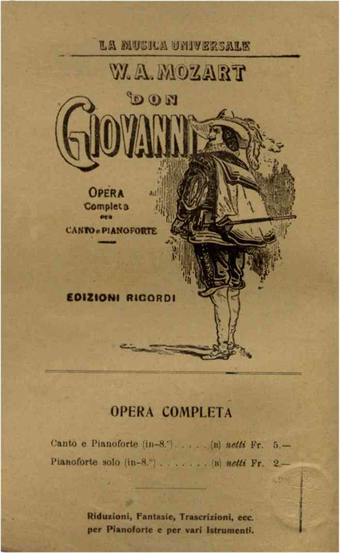 Libretto Don Giovanni opera completa per canto e pianoforte di W. A. Mozart